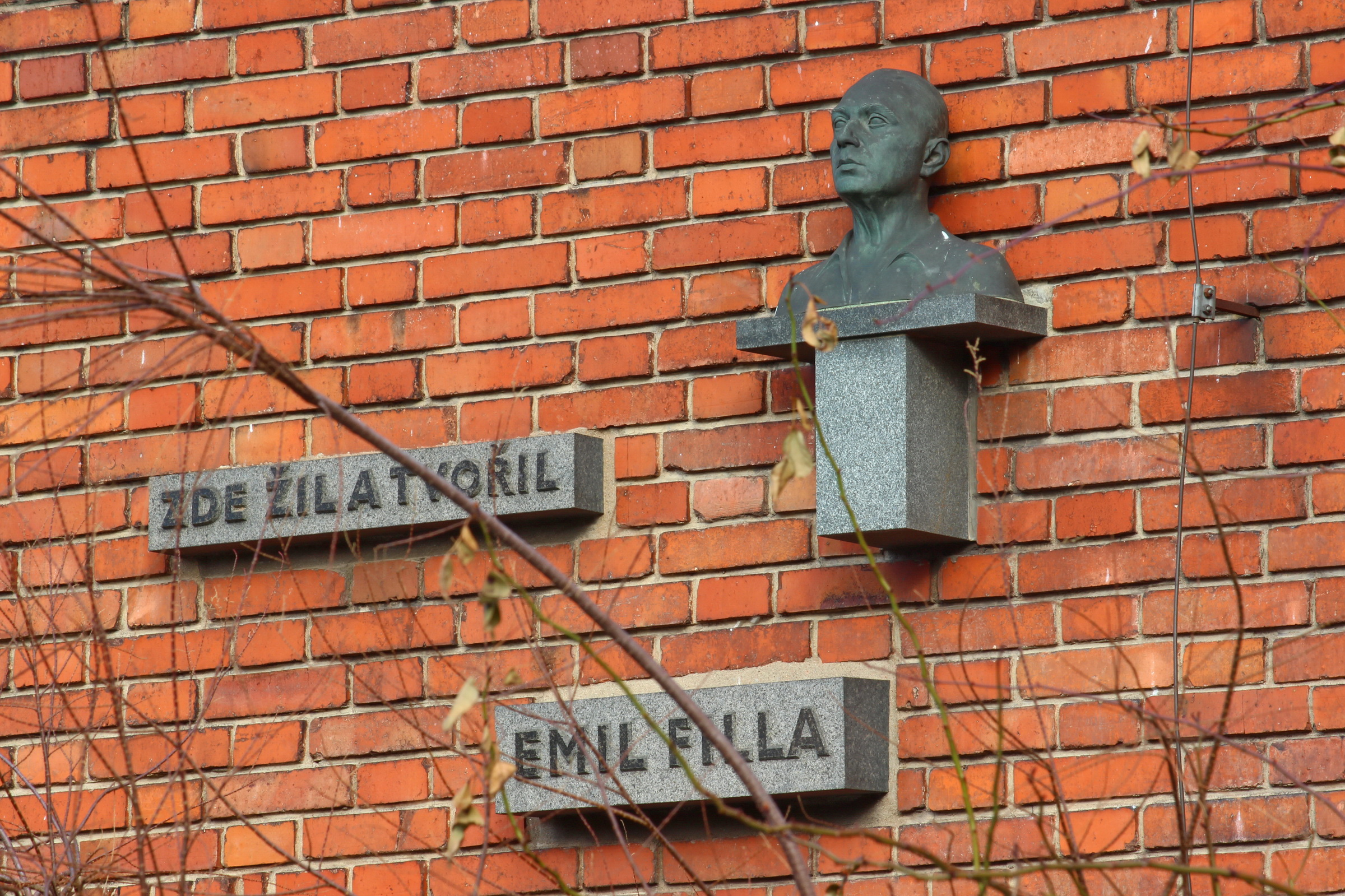 Pamětní deska Emila Filly, Praha 6 - Střešovice, čp.494, Lomená 12. Sochař: Otto Gutfreund, architekt: Jiří Novotný, písmo: Alena Gutfreundová-Novotná, 1965